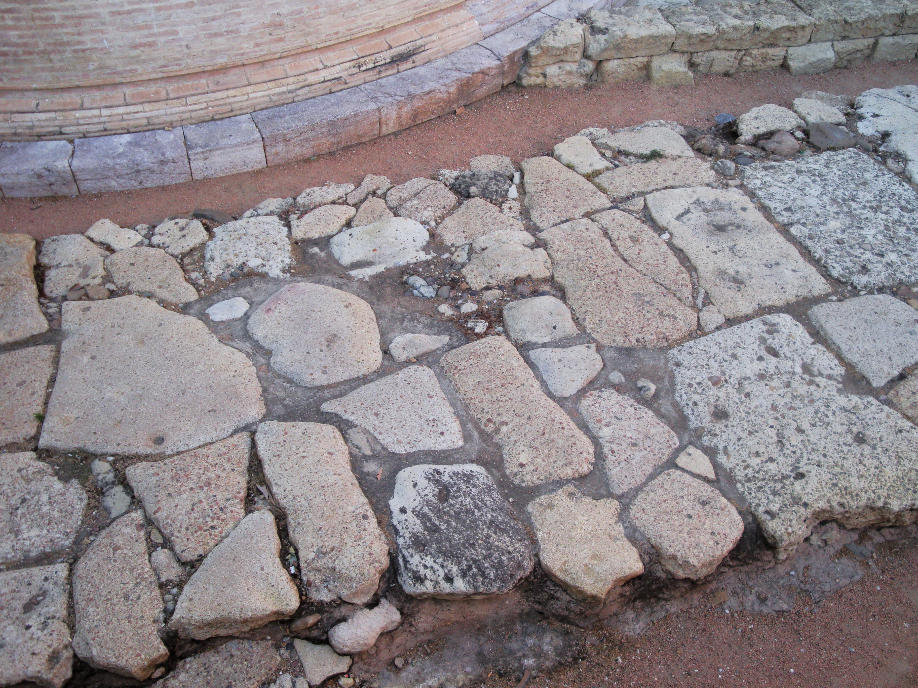 Calzada romana que cruza entre los monumentos funerarios de la Puerta de Gallegos, Córdoba (España).